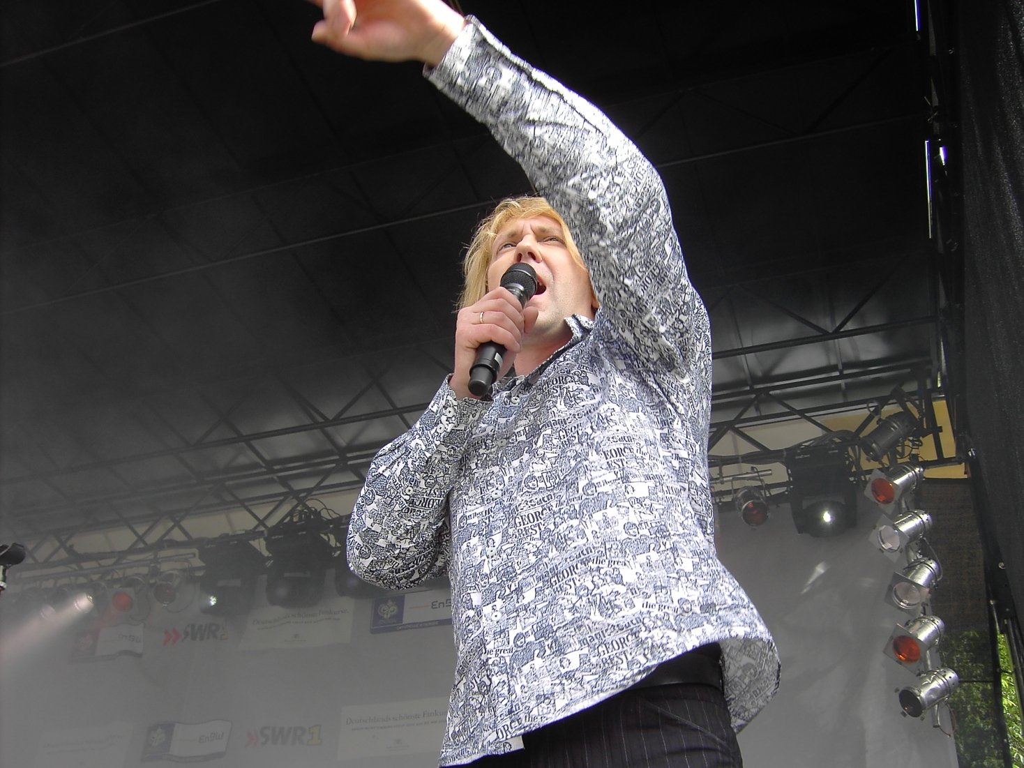 Tobias Künzel bei einem Konzert der Prinzen in Biberach/Riss am 20. Juni 2006. Zur Verfügung gestellt von weberberg.de, der Website für Biberach.